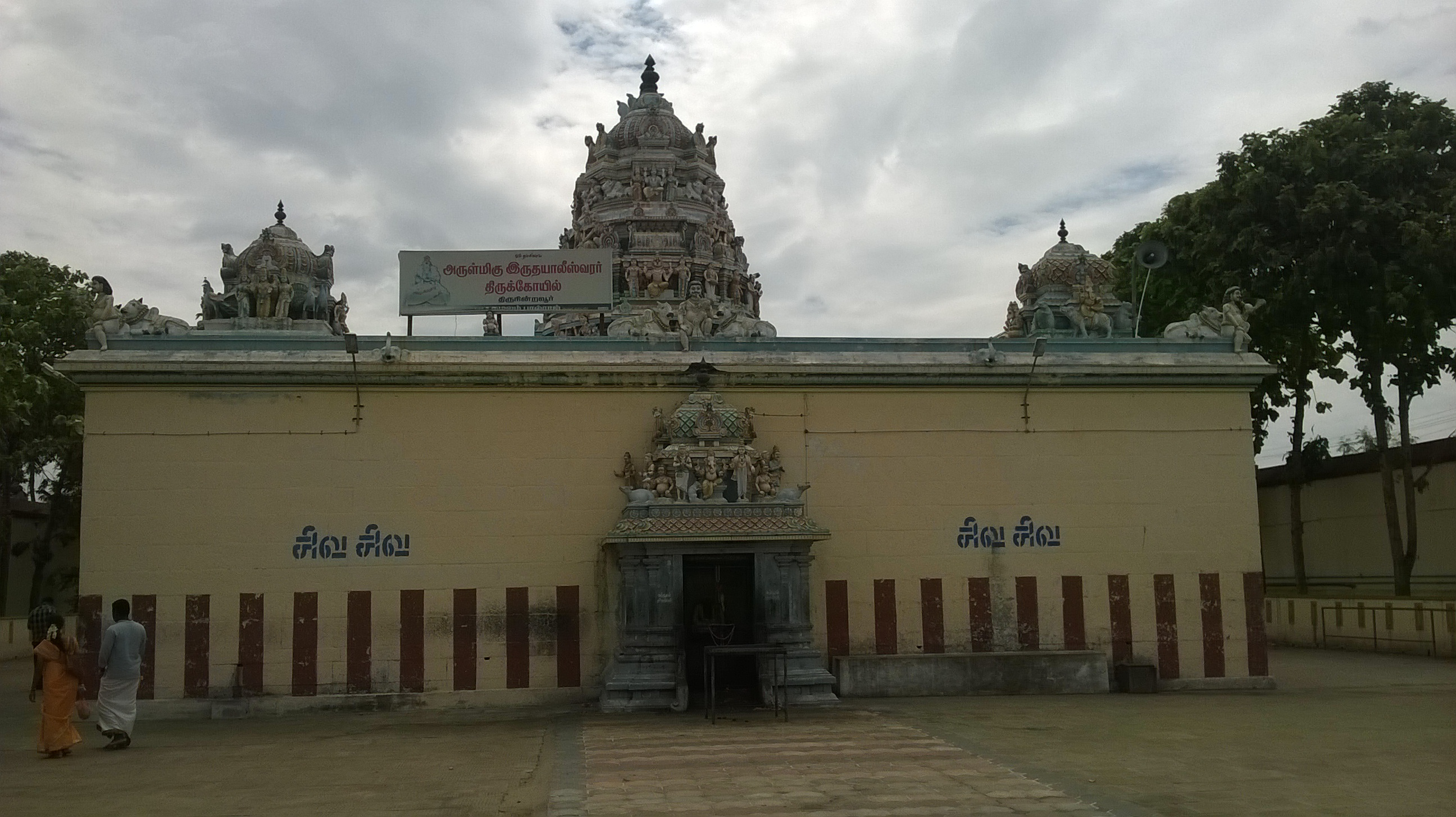 திருநின்றவூர் சிவன் கோவில்